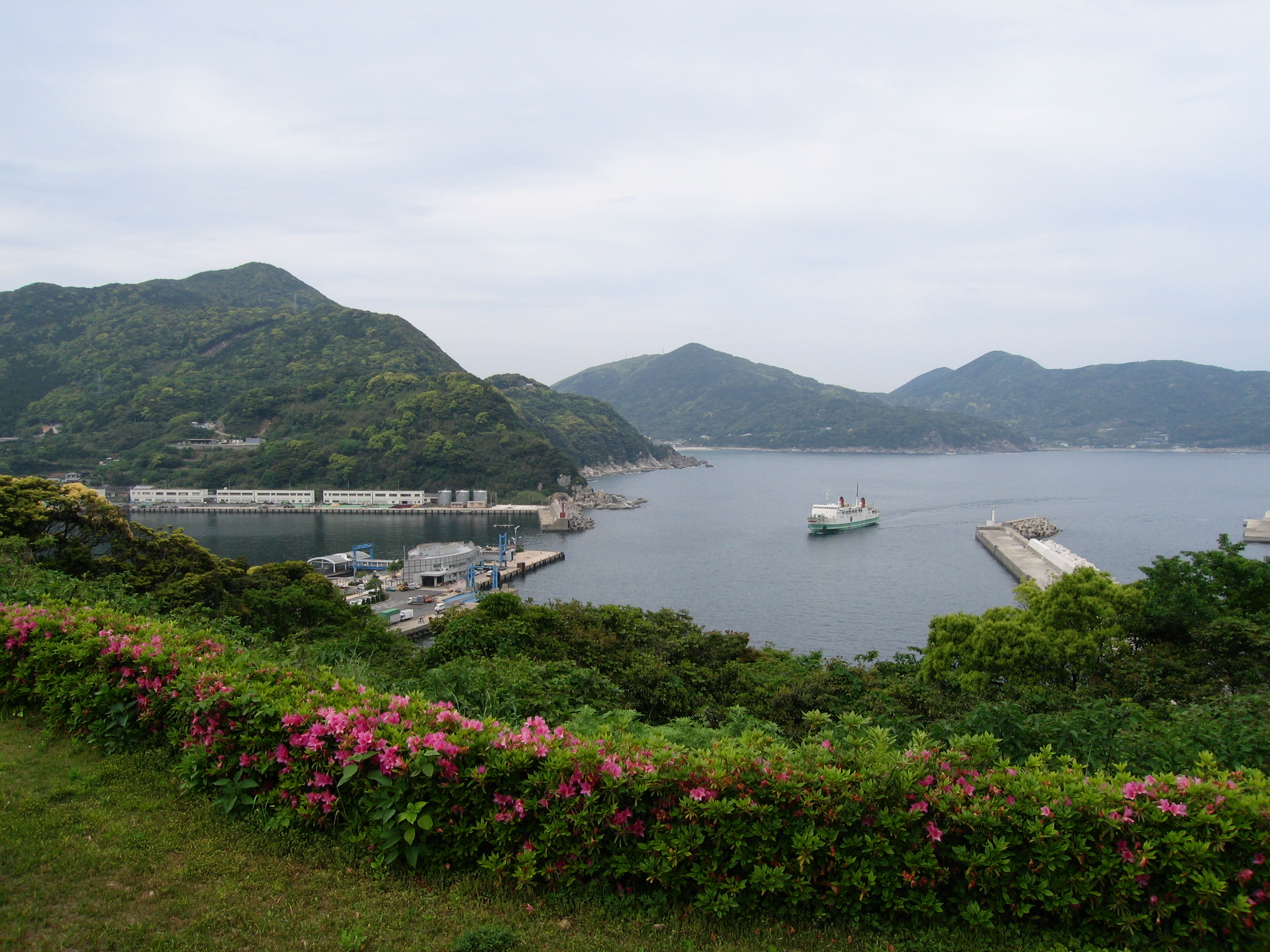 Ferry（フェリー）in Shinkamigoto, Nagasaki, Japan